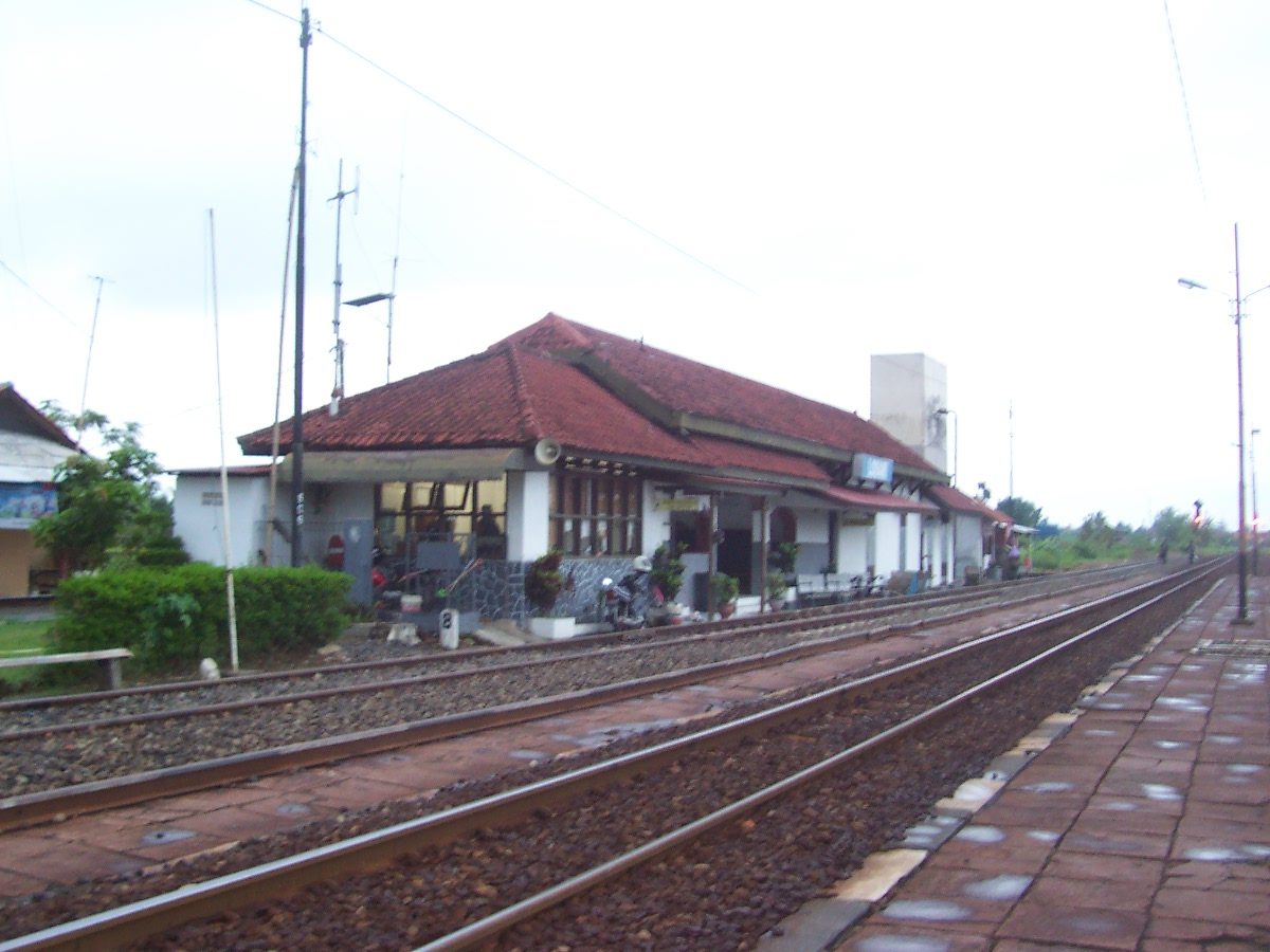 Stasiun Losari